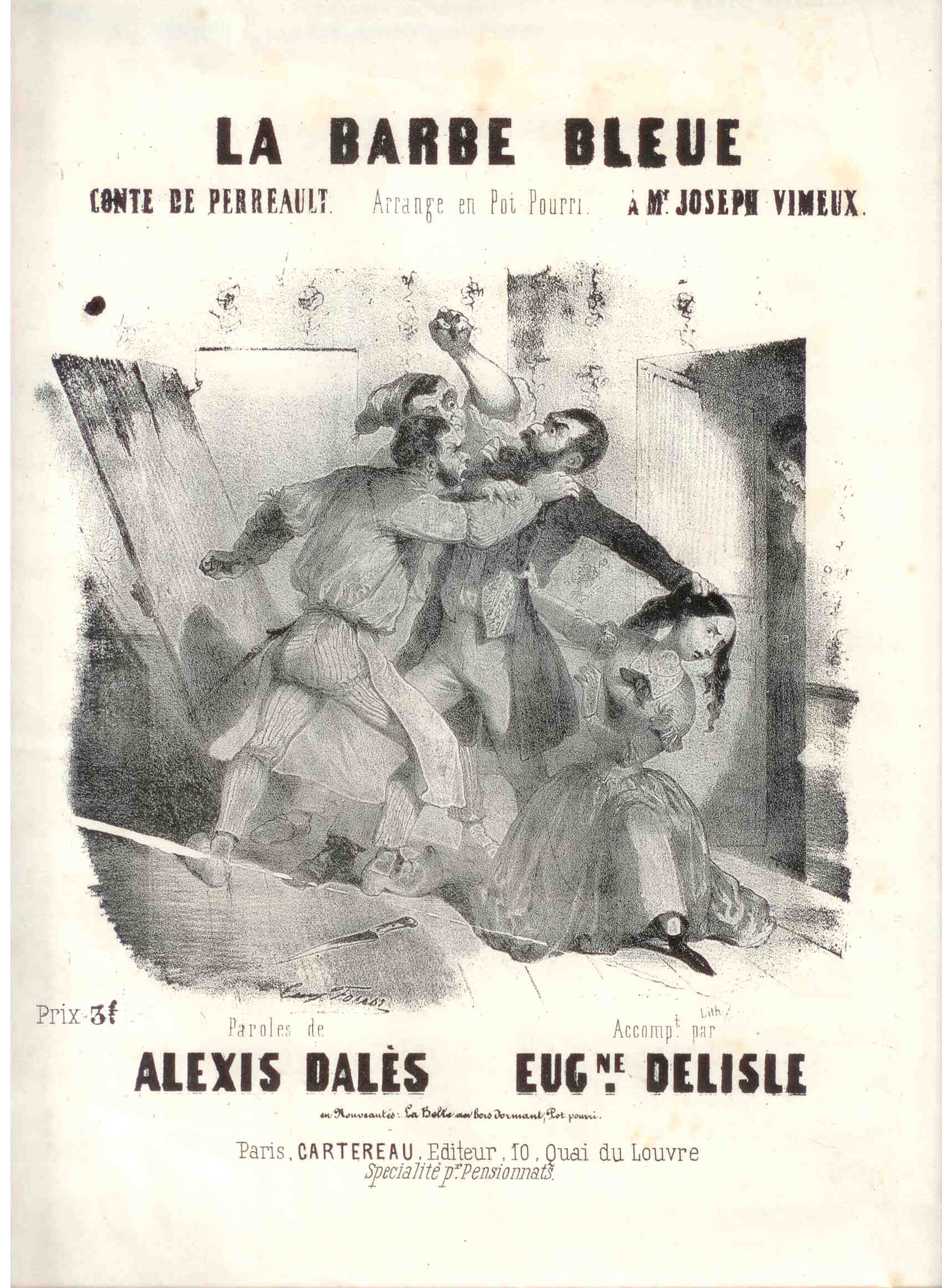 Illustration d'une partition d'Alexis Dalès